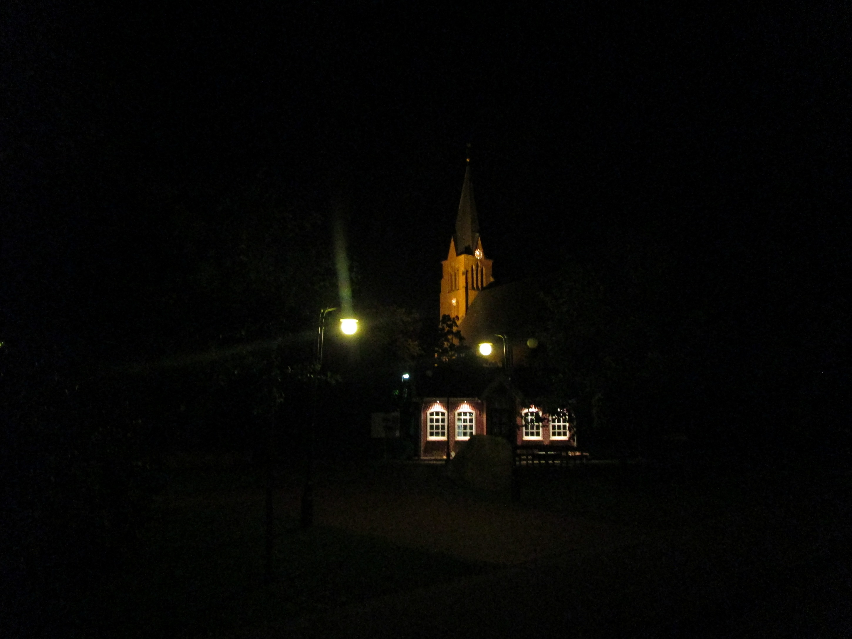 Rütenbrock St. Maximiliankirche bei Nacht 2016